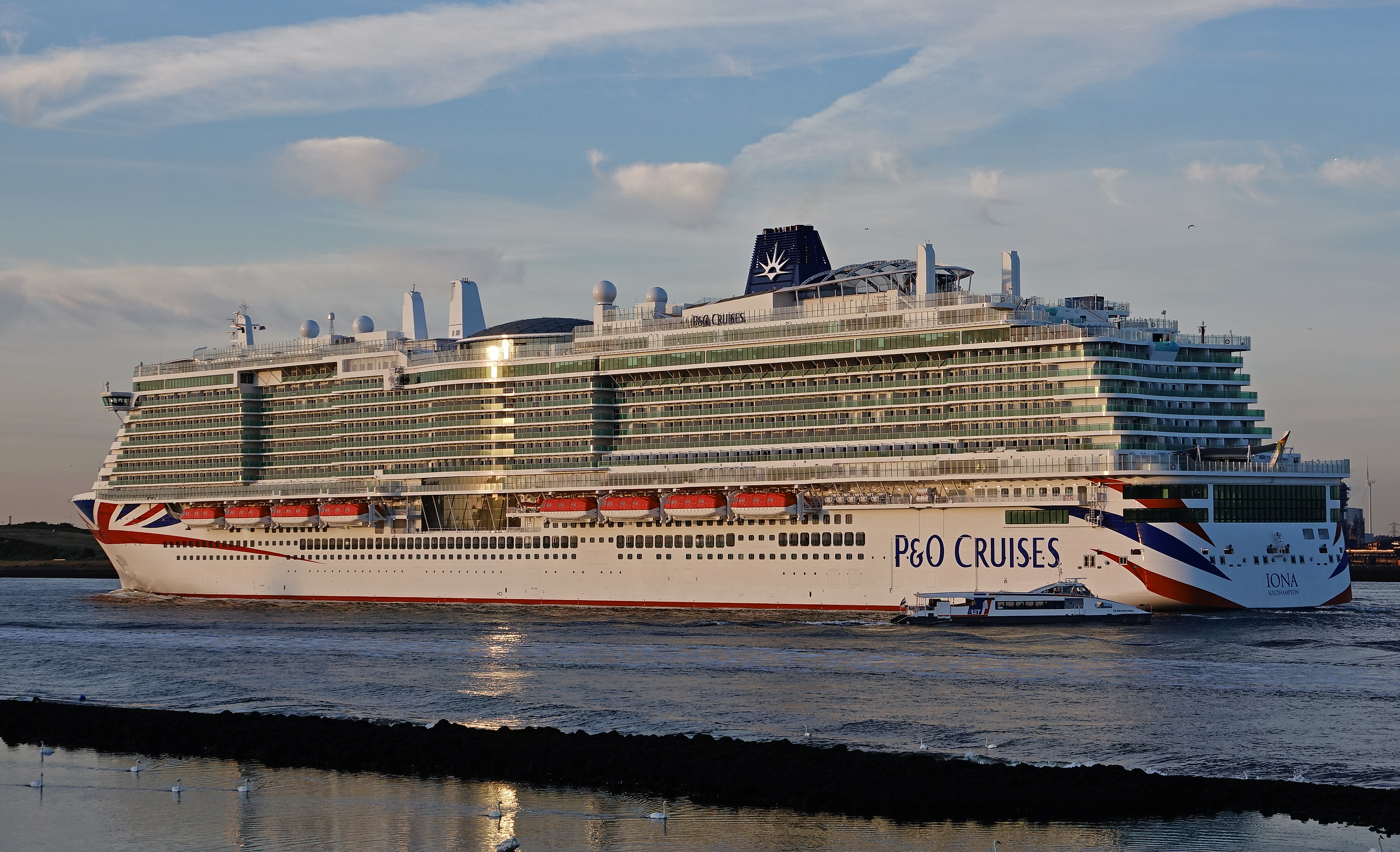 Hoek van Holland 2-6-2020